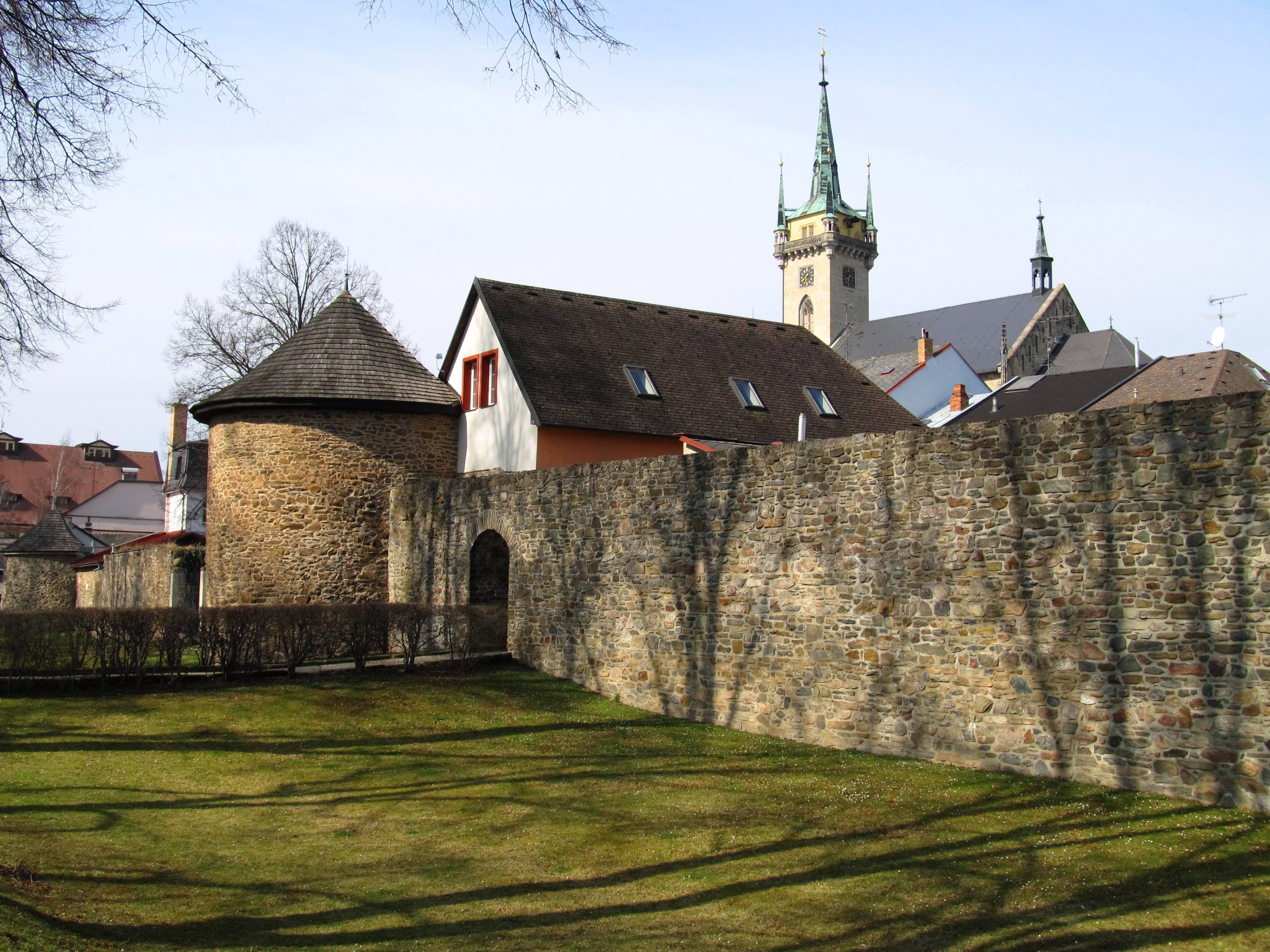 Pohled na hradby z městského parku s věží kostela sv. Jakuba.